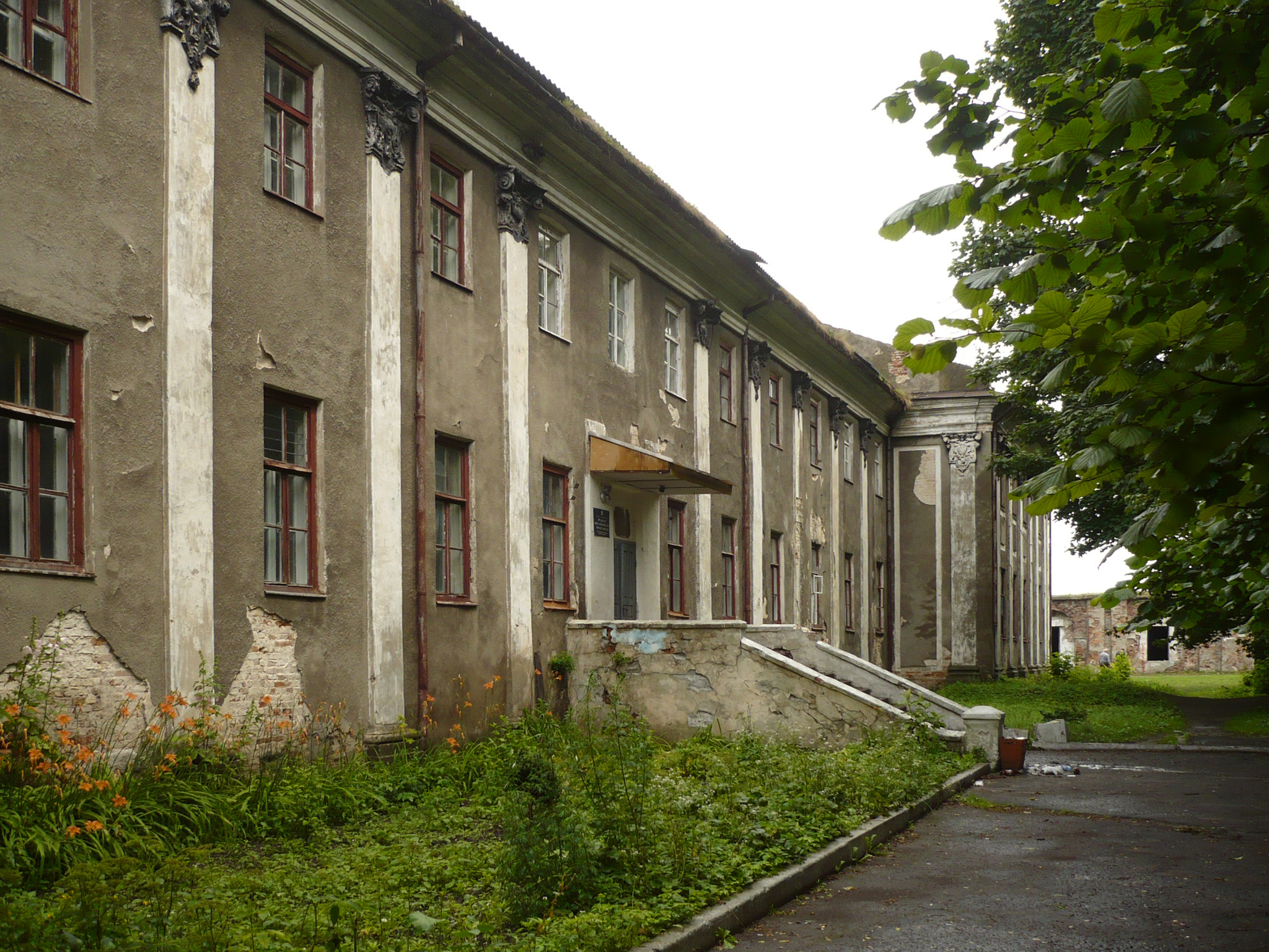 Pałac Potockich z poł. XVIII wieku w Brodach na Ukrainie